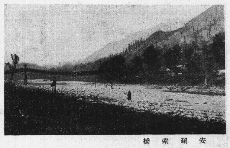 鄭璧成著四川導遊插圖